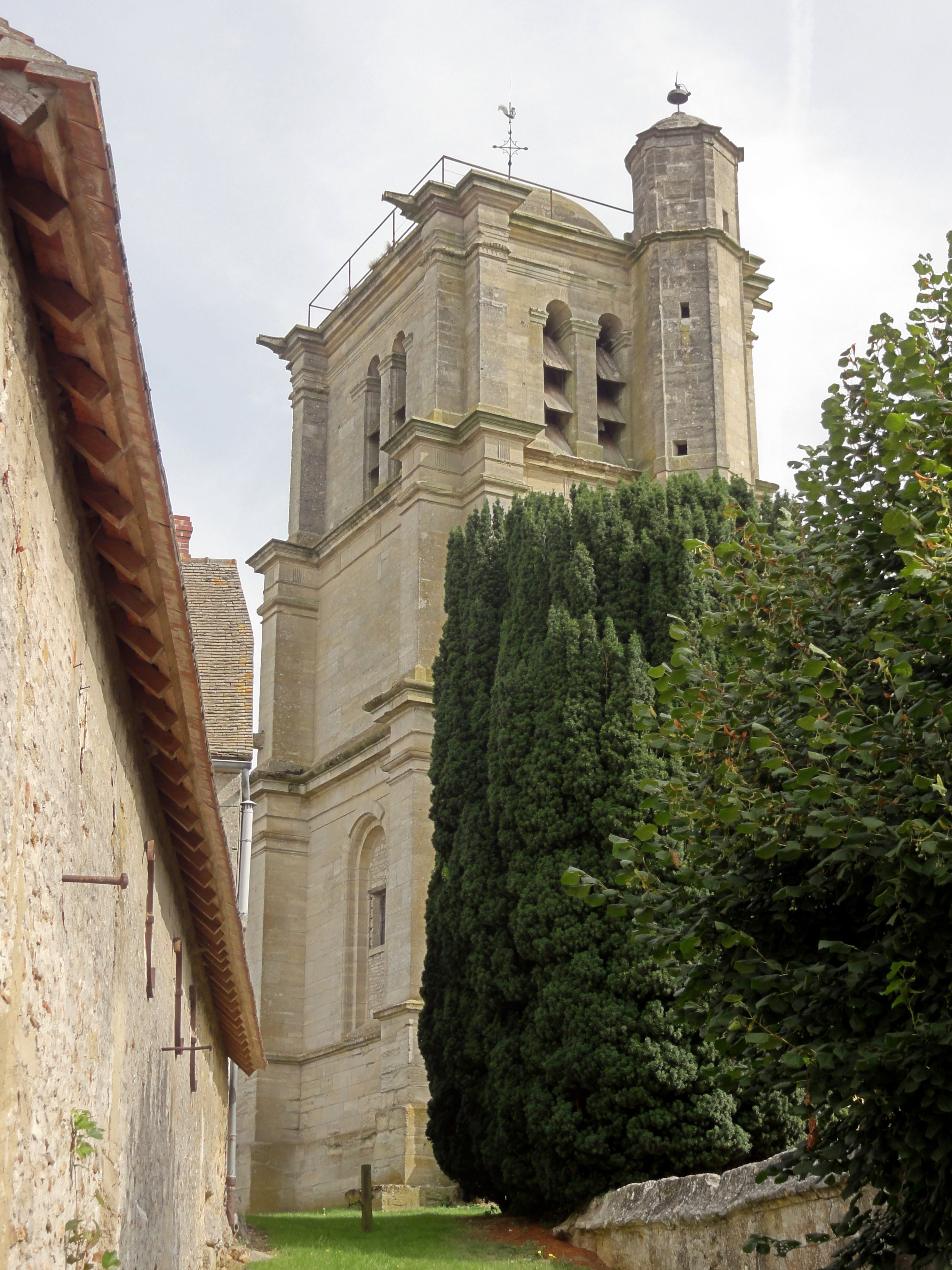 Clocher.